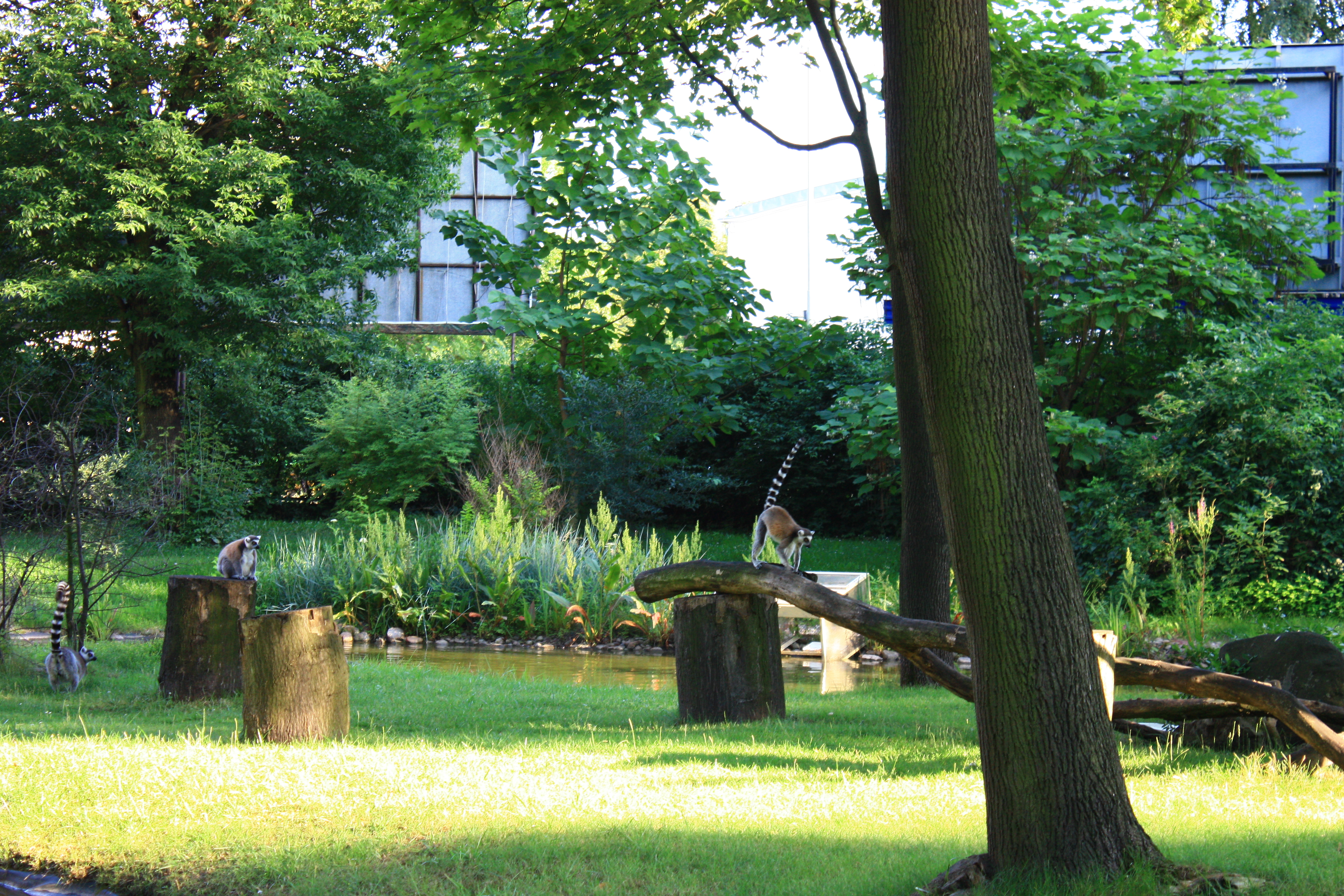 Poznań, ogród zoologiczny (stary), kon. XIX